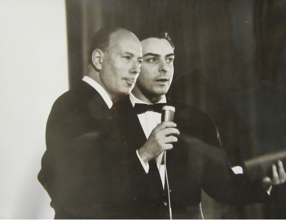 L'attore Ernesto Calindri e Daniele Piombi al Teatro Nuovo di Salsomaggiore